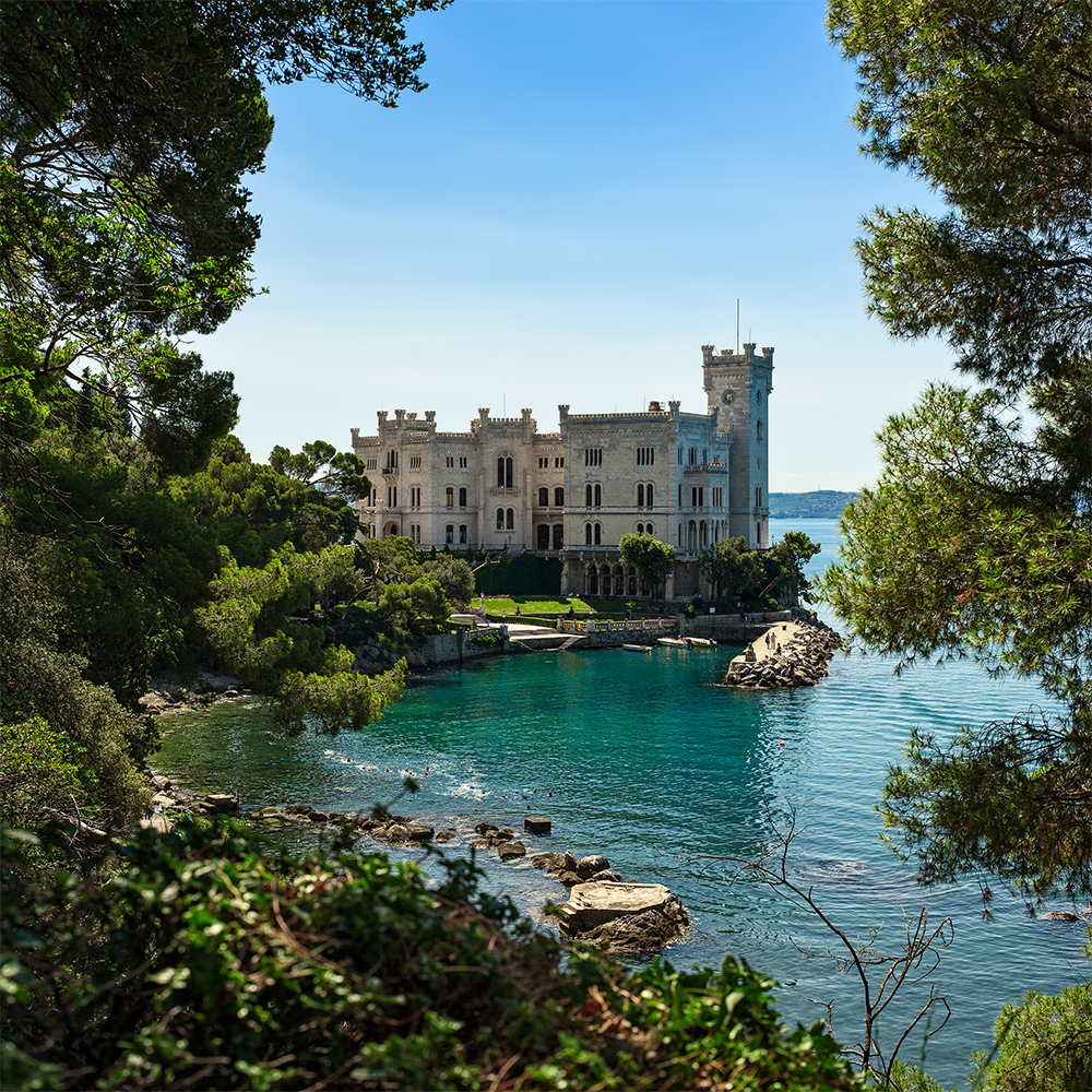 Mirmare vom Park aus gesehen